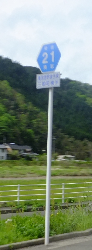 鳥取県東伯郡三朝町横手 鳥取県道21号鳥取鹿野倉吉線 標識